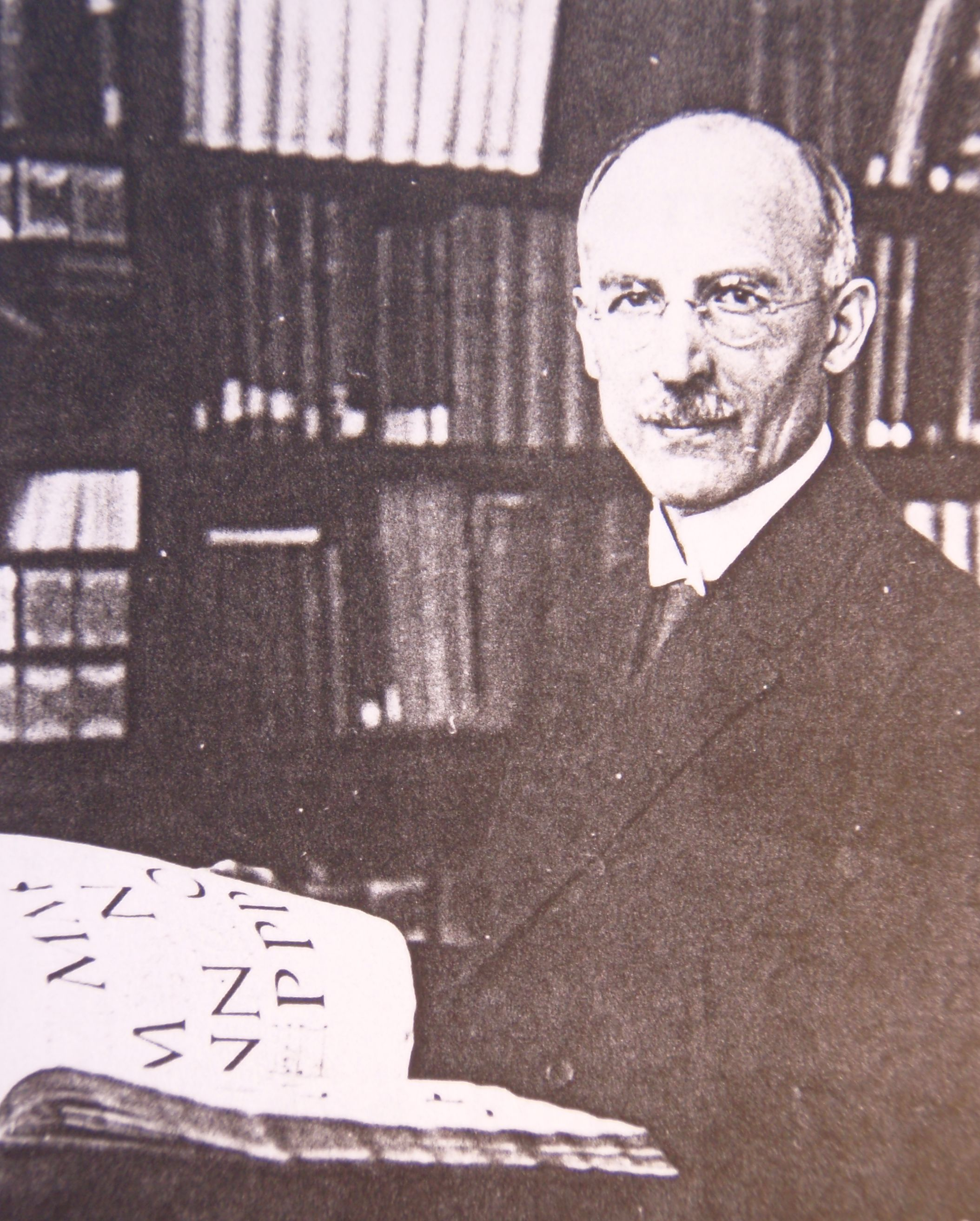 Originalfoto wurde erstellt vor dem 20.06.1950. Foto zum 70. Geburtstag von Dr. Hermann Reuter, Mundartforscher und Bibliothekar a.D. (Leiter der Landes- und Stadtbibliothek Düsseldorf)